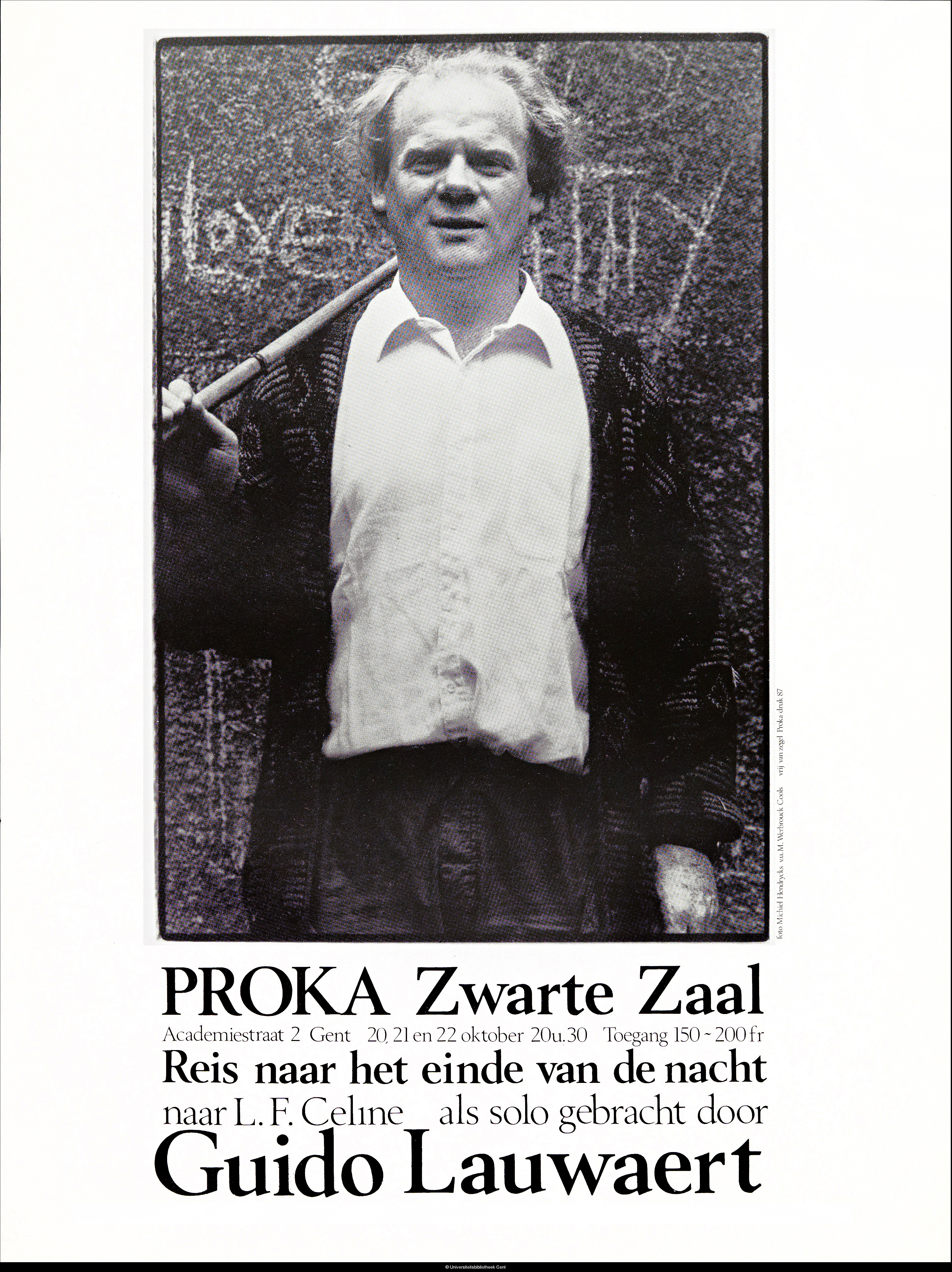 Affiche 'Reis naar het einde van de nacht', een solo van Guido Lauwaert naar de roman van L.F. Celine PROKA Zwarte Zaal - Gent, 1982 foto en typografie Michiel Hendryckx